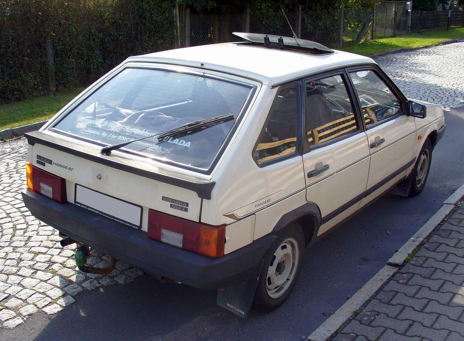 Lada Samara